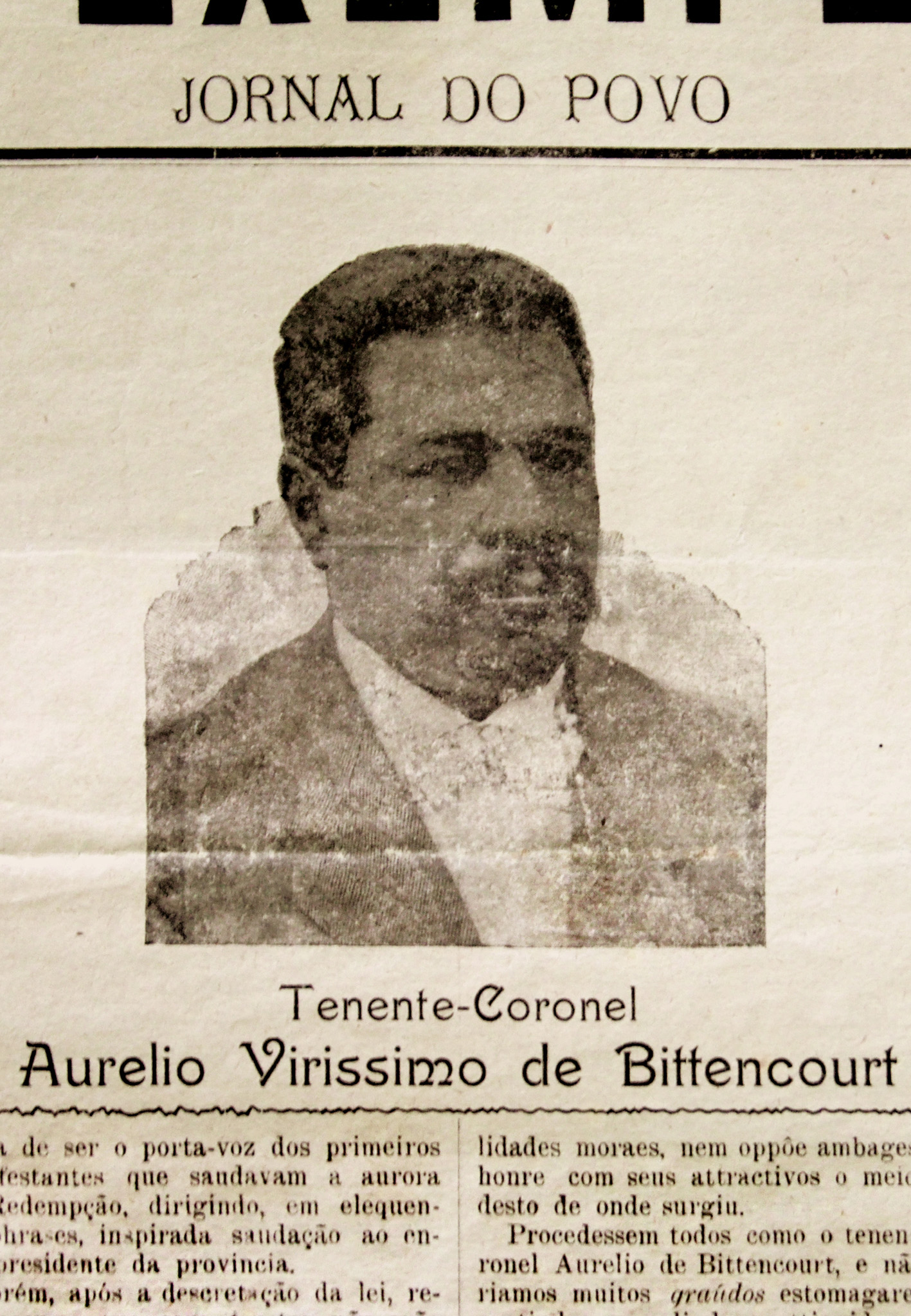 Aurélio Veríssimo de Bittencourt, homenagem do jornal O Exemplo, Porto Alegre, 13/5/1904.